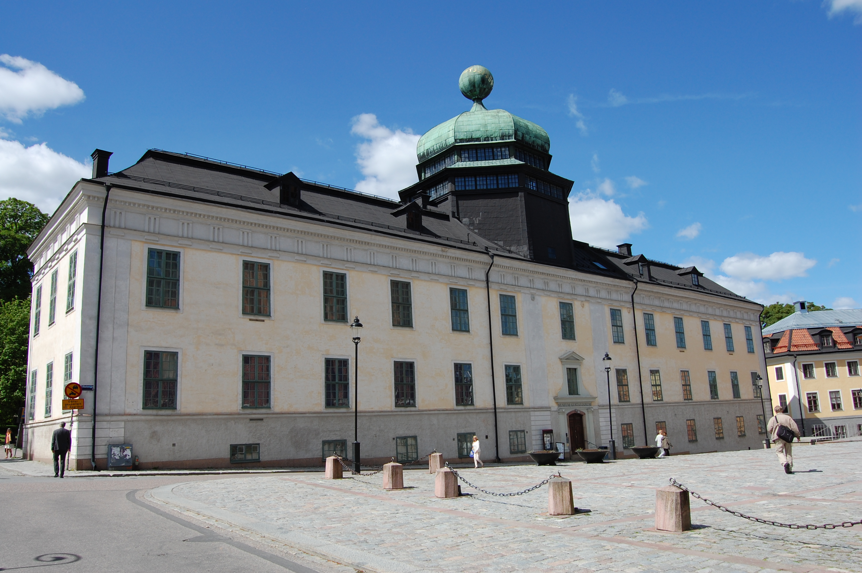 Gustavianum från Biskopsgatan.